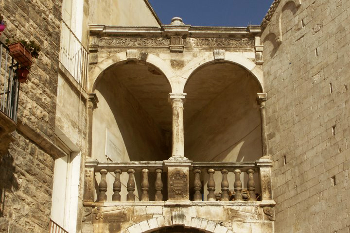 Loggia delle benedizioni, tra la concattedrale e il Palazzo De Lerma. Loggia delle Benedizioni, di epoca cinquecentesca, che fa da ponte tra palazzo De Lerma e la chiesa. Loggia cinquecentesca tra la cattedrale e il palazzo De Lerma.